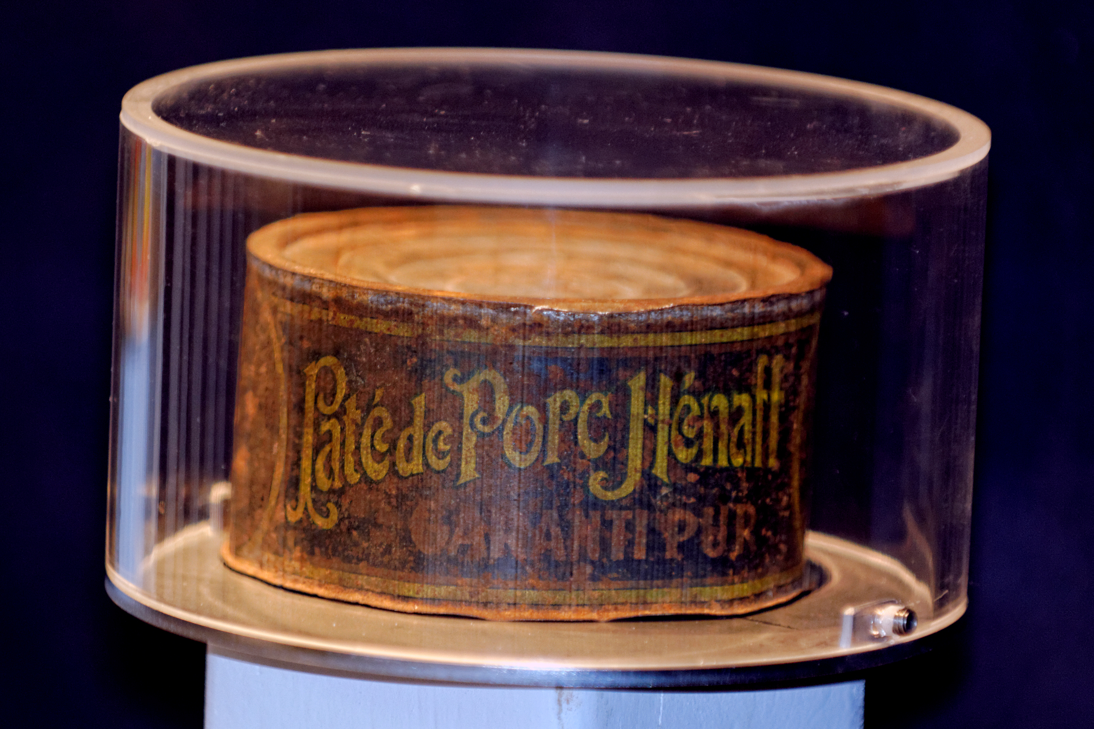 Boîte du Pâté Hénaff exposée à la Maison du Pâté Hénaff à Pouldreuzic.